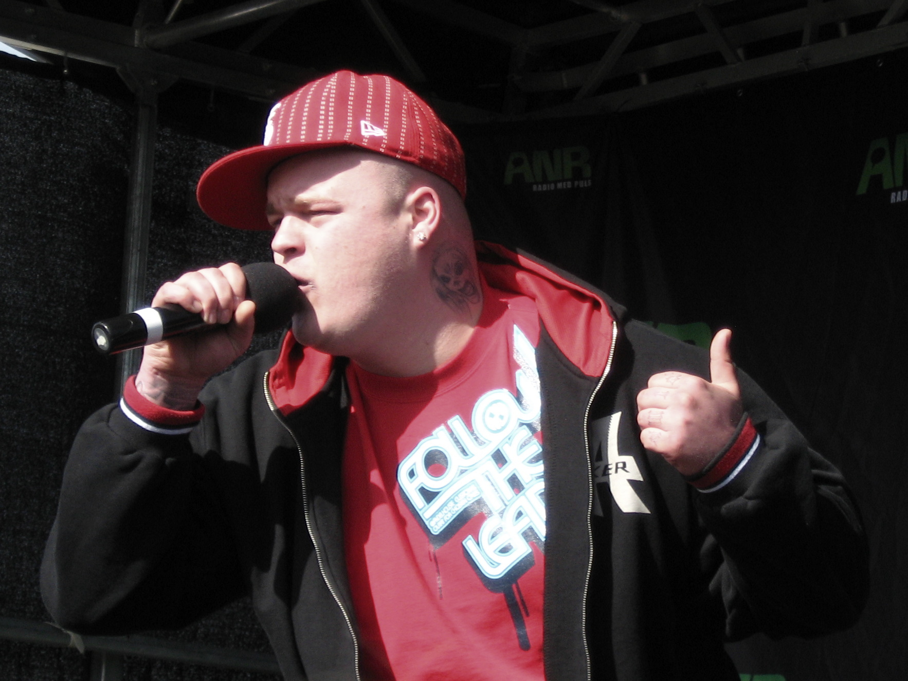 Kalle Pimp @ Skovmand & Bues Fødselsdag i Hirtshals